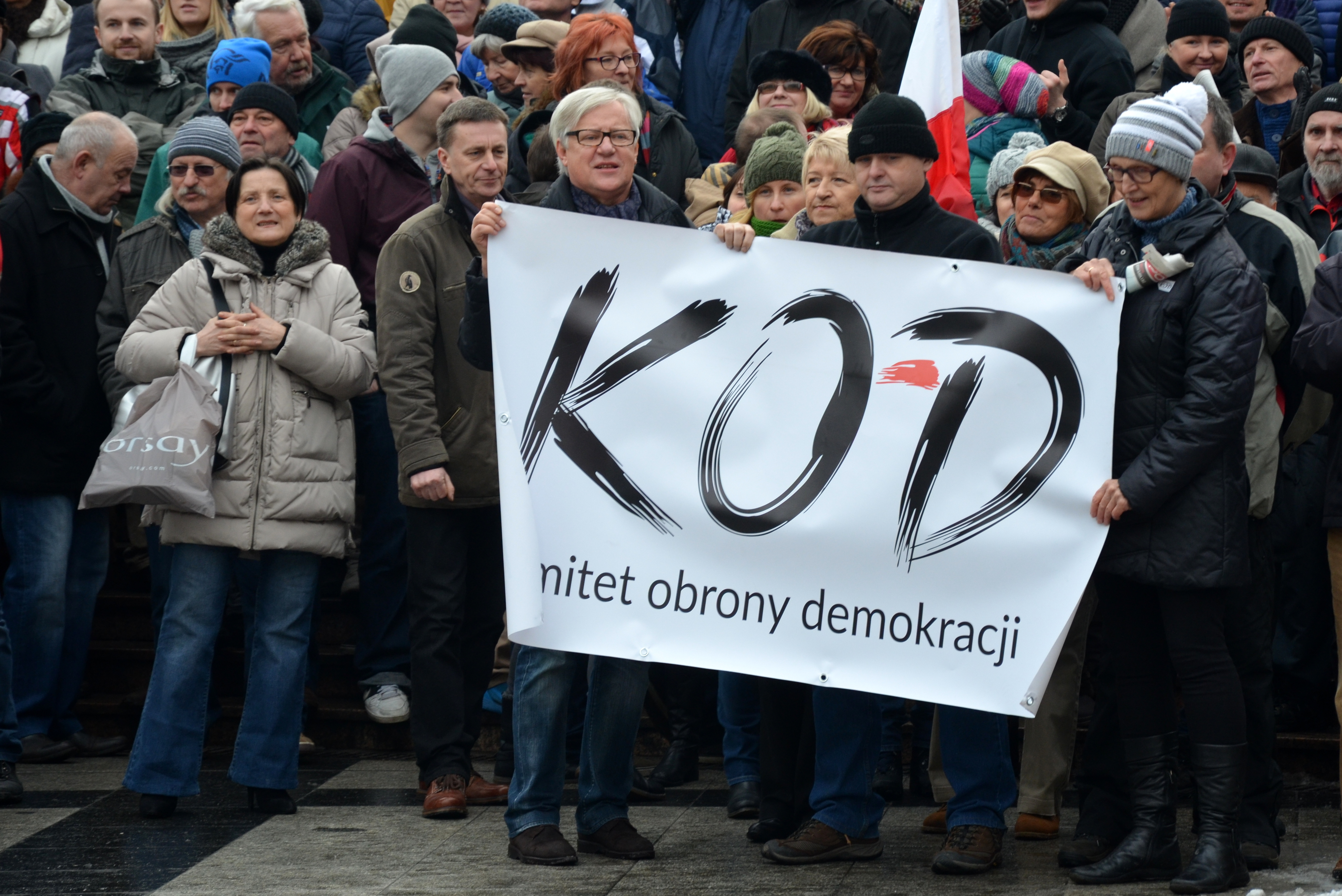 Teilnehmer einer KOD-Demonstration in Bielsko-Biala